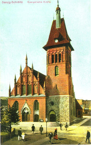 Nieistniejący neogotycki (ewangelicki) Kościół Zbawiciela (Heilandskirche) w Gdańsku Siedlcach z 1901 r. Uszkodzony w 1945 r., został rozebrany po wojnie. Stał przy ul. Kartuskiej, na obecnie niezabudowanej parceli obok VIII LO (był kolejnym budynkiem w kierunku zachodnim).